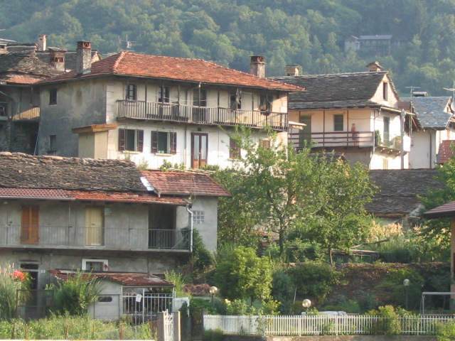 Il centro storico di Rovegro, una delle porte della Val Grande, in comune di San Bernardino Verbano (VB)